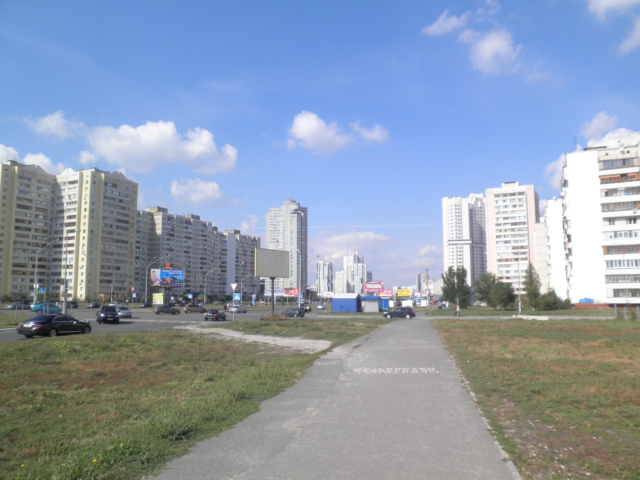 Проспект Петра Григоренка У Києві